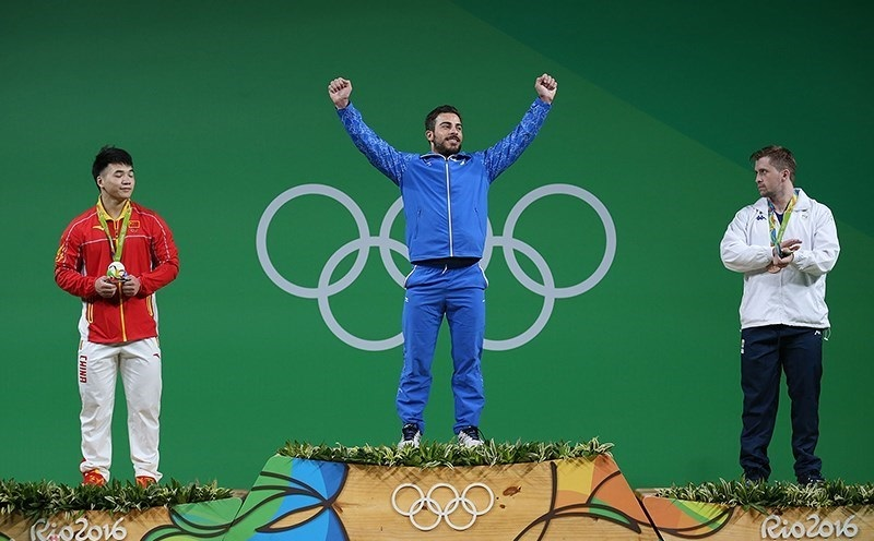 کیانوش رستمی در بازی‌های المپیک تابستانی ۲۰۱۶